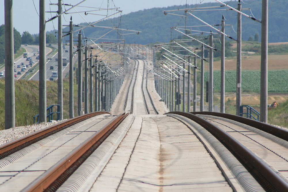 Noch im Bauzustand befindliche Neubaustrecke Nürnberg-Ingolstadt bei Weinsfeld nahe Hilpoltstein.